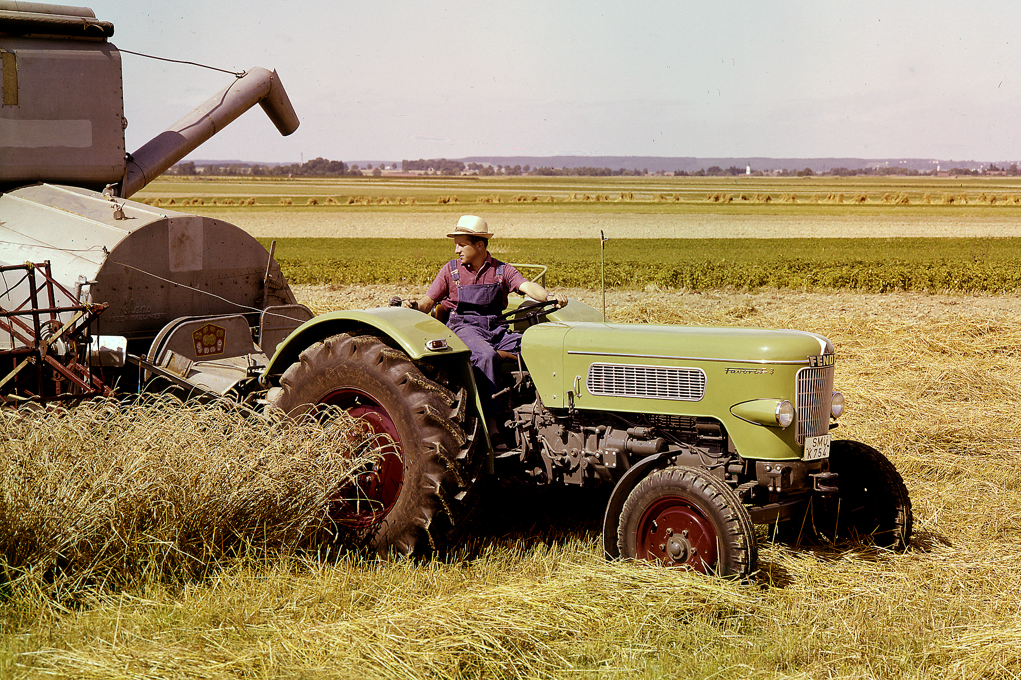 Fendt Favorit 3 mit einem gezogenem Mähdrescher